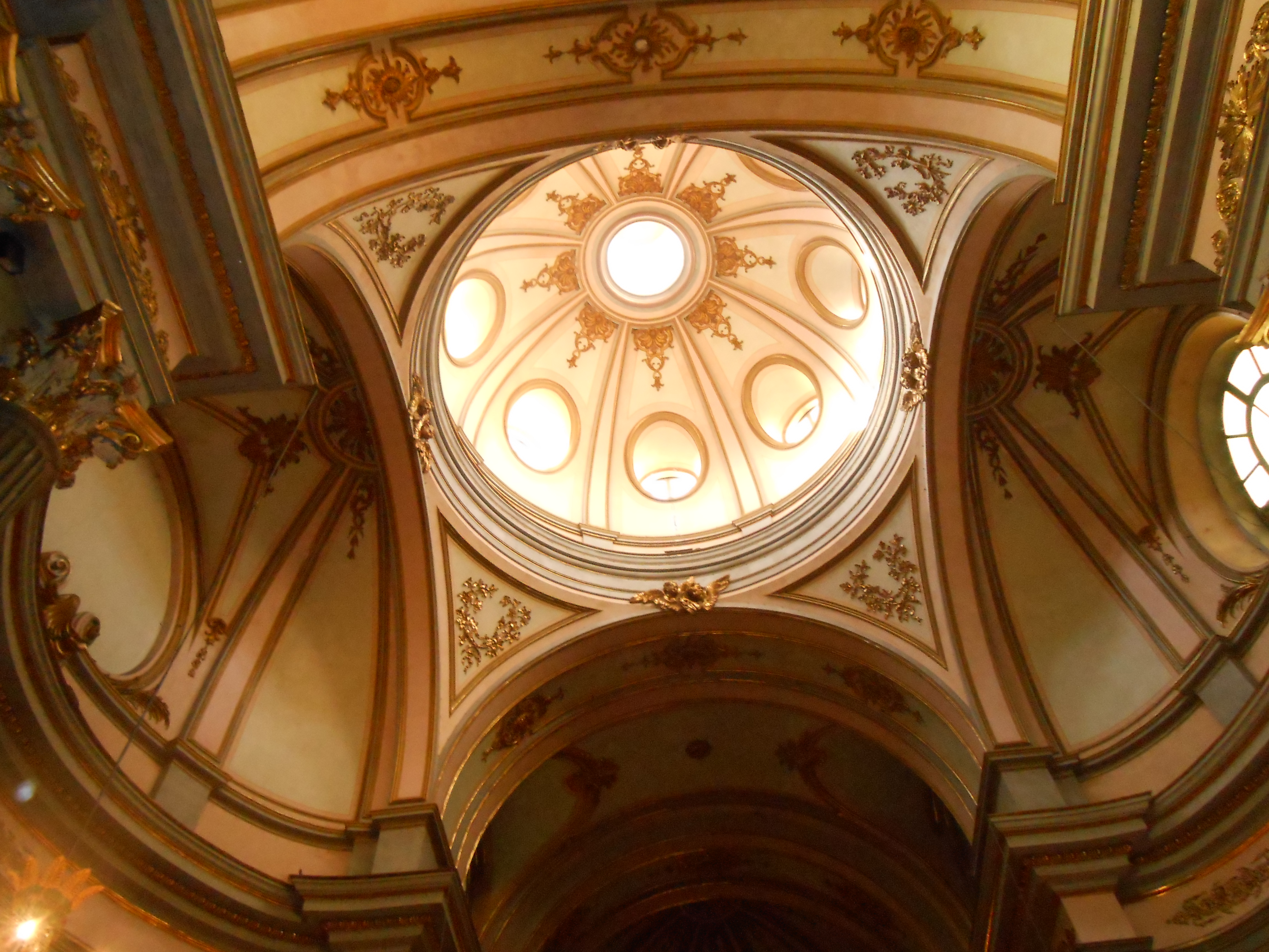 cupola della chiesa del Santo Spirito